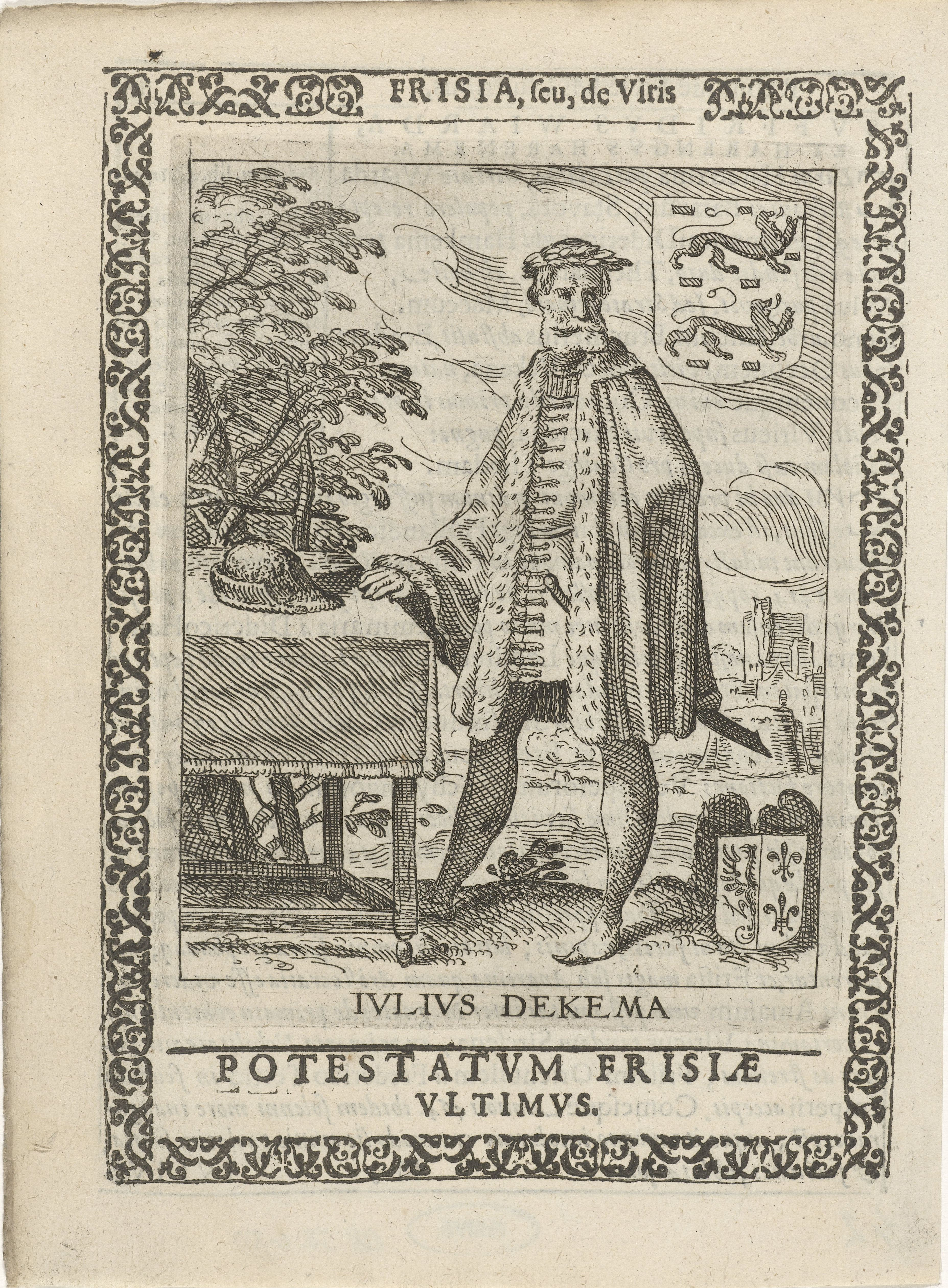 IdentificatieTitel(s): Juw Dekama, laatste potestaat van Friesland. Julius Dekema. Potestatum Frisiae Ultimus (titel op object) Koningen en Potestaten van Friesland (serietitel) Frisia, sev, de Viris (serietitel op object)Objecttype: prent boekillustratie Serienummer: 42/53Objectnummer: RP-P-OB-50.650Catalogusreferentie: Hollstein Dutch 84FMH 89-[42]Opschriften / Merken: verzamelaarsmerk, verso, gestempeld: Lugt 2228Omschrijving: Juw of Julius Dekama, laatste potestaat van Friesland. Staande ten voeten uit, naast een tafel waarop een hoed ligt. Illustratie, met tekst op achterzijde, afkomstig uit het boek: Frisia seu de viris rebusque Frisiae illustribus libri duo.VervaardigingVervaardiger: prentmaker: Pieter Feddes van HarlingenPlaats vervaardiging: FrieslandDatering: 1618 - 1620Fysieke kenmerken: de voorstelling geëtst en afgedrukt binnen een ornamentale rand in houtsnede met opschriften in boekdrukMateriaal: papier Techniek: etsen / houtsnede / boekdrukAfmetingen: plaatrand: h 125 mm × b 100 mmomlijsting: h 158 mm × b 115 mmOnderwerpWat: ruler, sovereign Nederland onder de HabsburgersWaar: FrieslandWie: Juw DekamaVerwerving en rechtenVerwerving: onbekendCopyright: Publiek domein